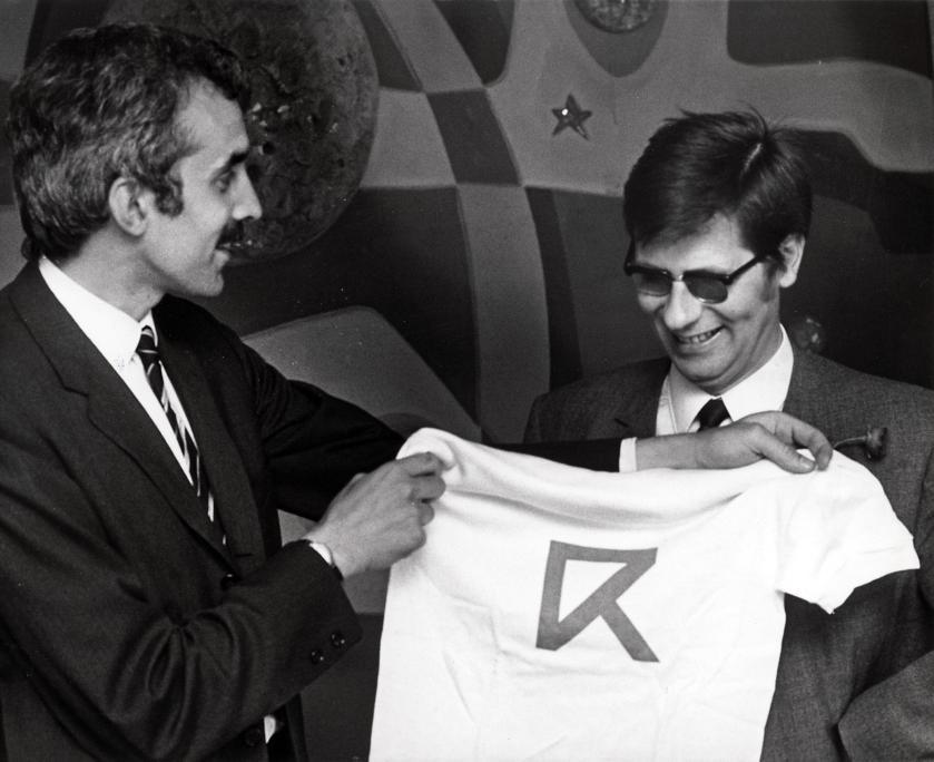 J.J.G. Tonnaer krijgt van Eric Jurgens een partijshirt bij zijn installatie als voorzitter van de PPR. Rotterdam, Nederland, 13 juni 1970.